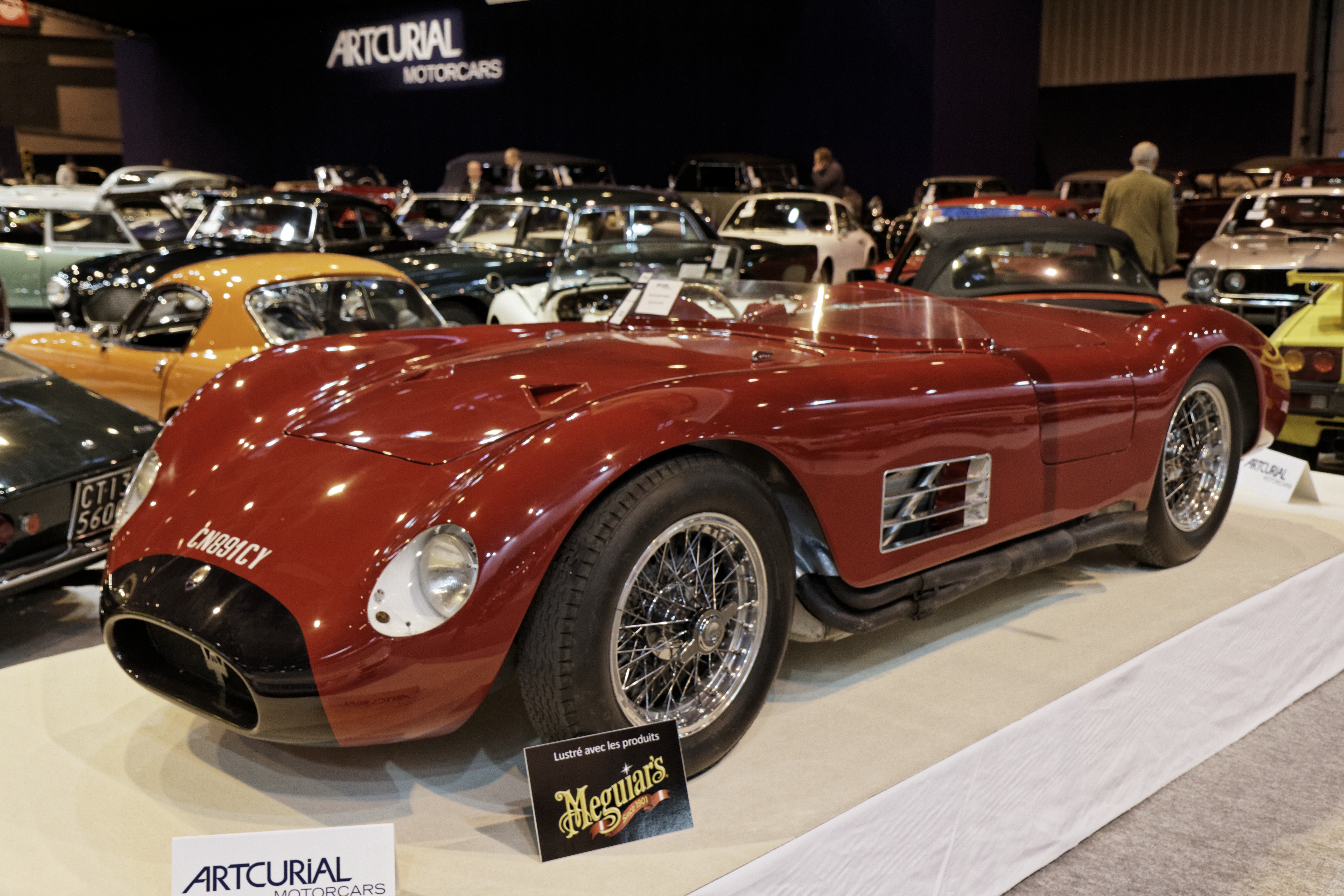 Une Maserati 150 S exposée lors du salon Retromobile 2014